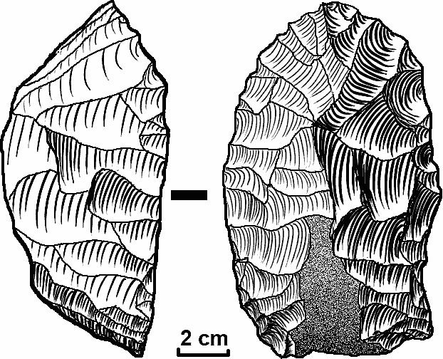 Raspador carenado, tipo no real